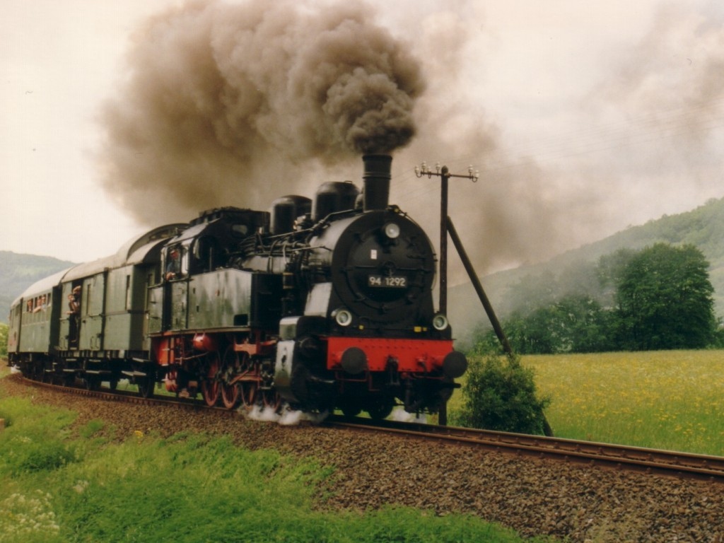 Sonderfahrt auf der Aar-Salzböde-Bahn mit 94 1292